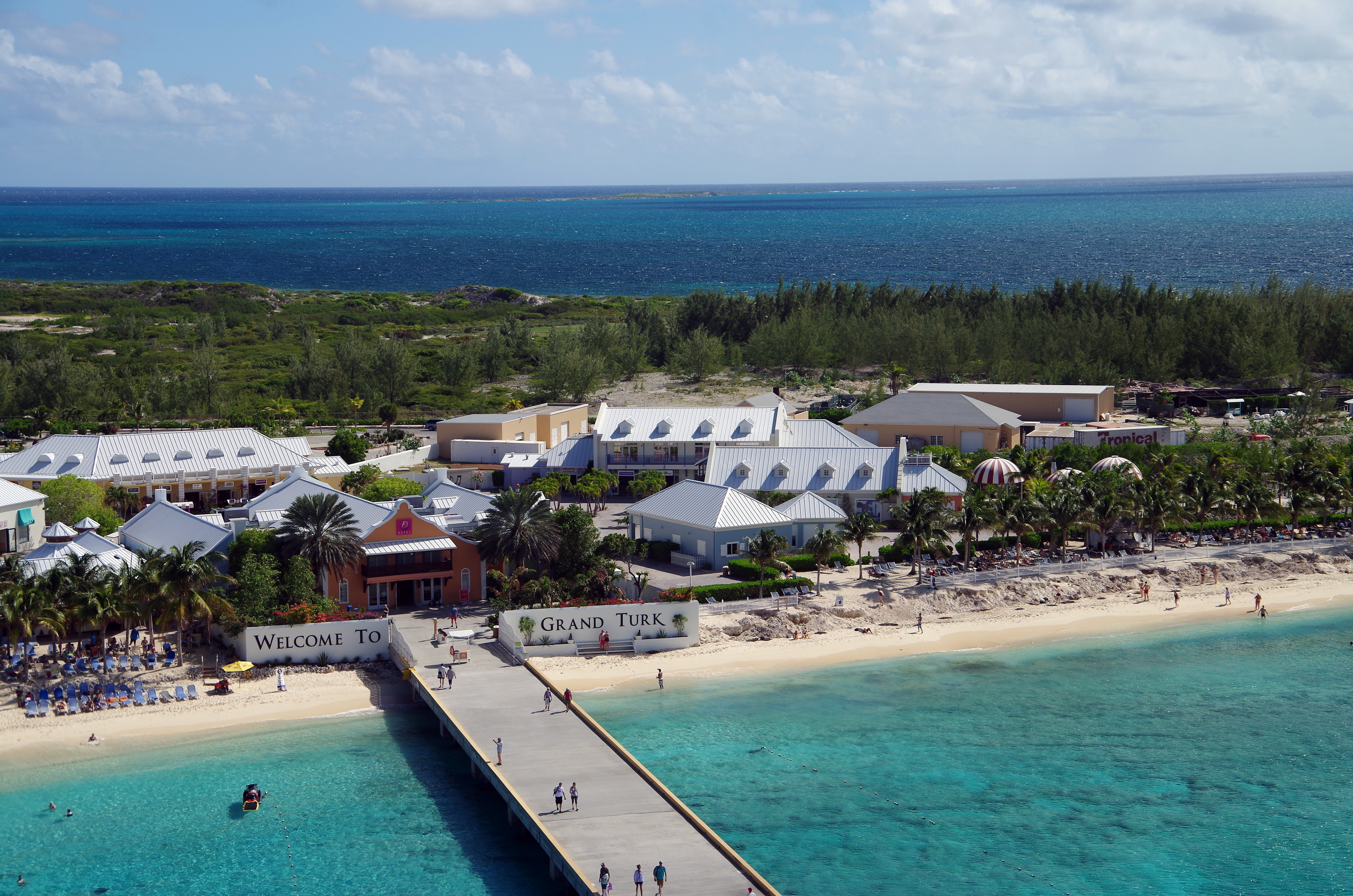 Kreuzfahrtanleger vom Schiff gesehen